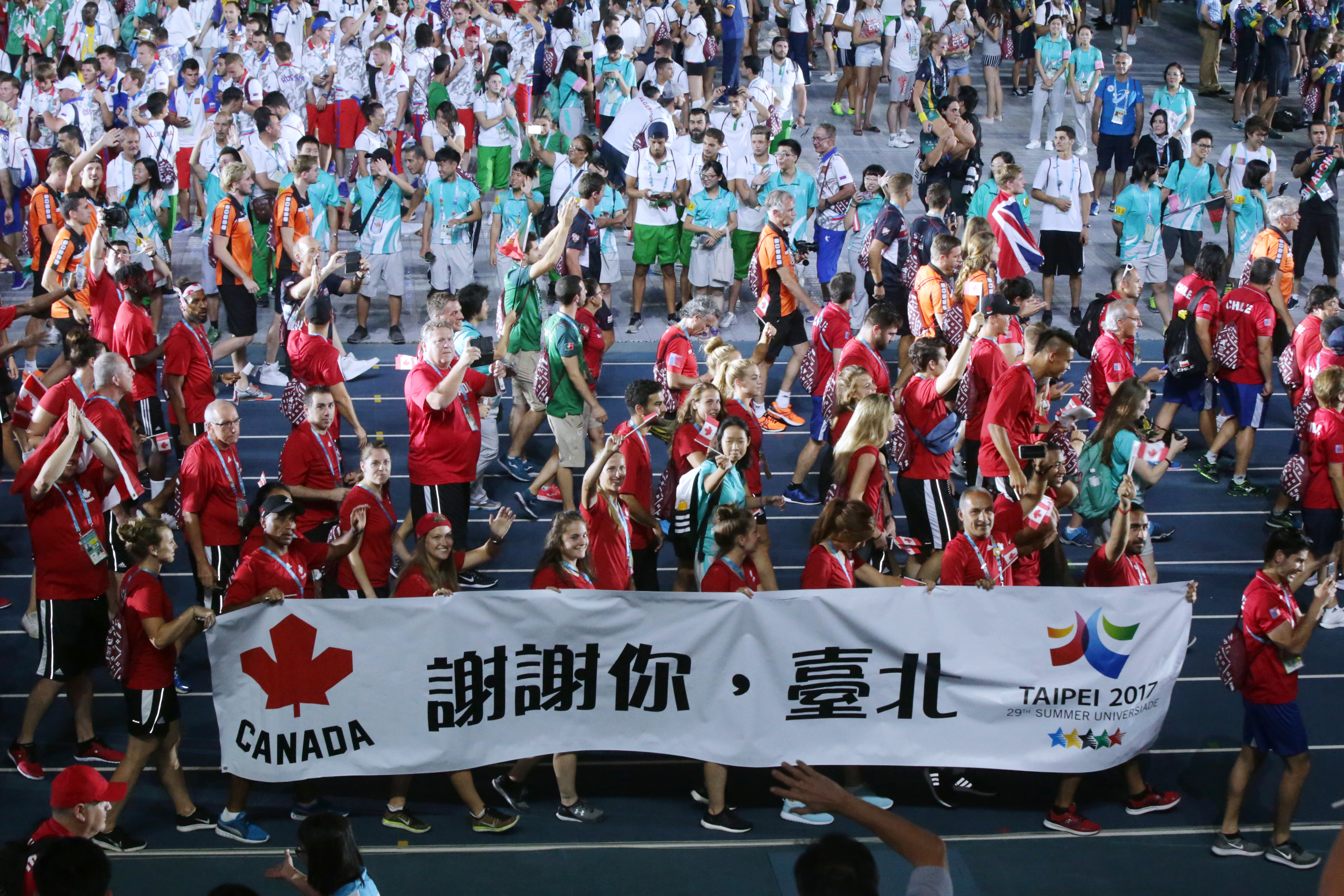 授權方式及範圍：中華民國總統府│政府網站資料開放宣告 Authorization Method & Scope: Office of the President, Republic of China (Taiwan) | Government Website Open Information Announcement